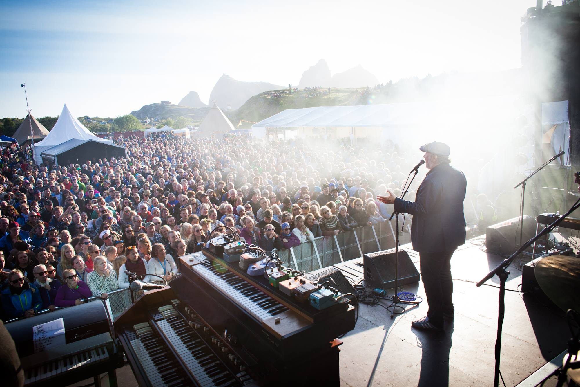 Bjørn Eidsvåg på Træna Fyr, foto: Kristian Sivertsen